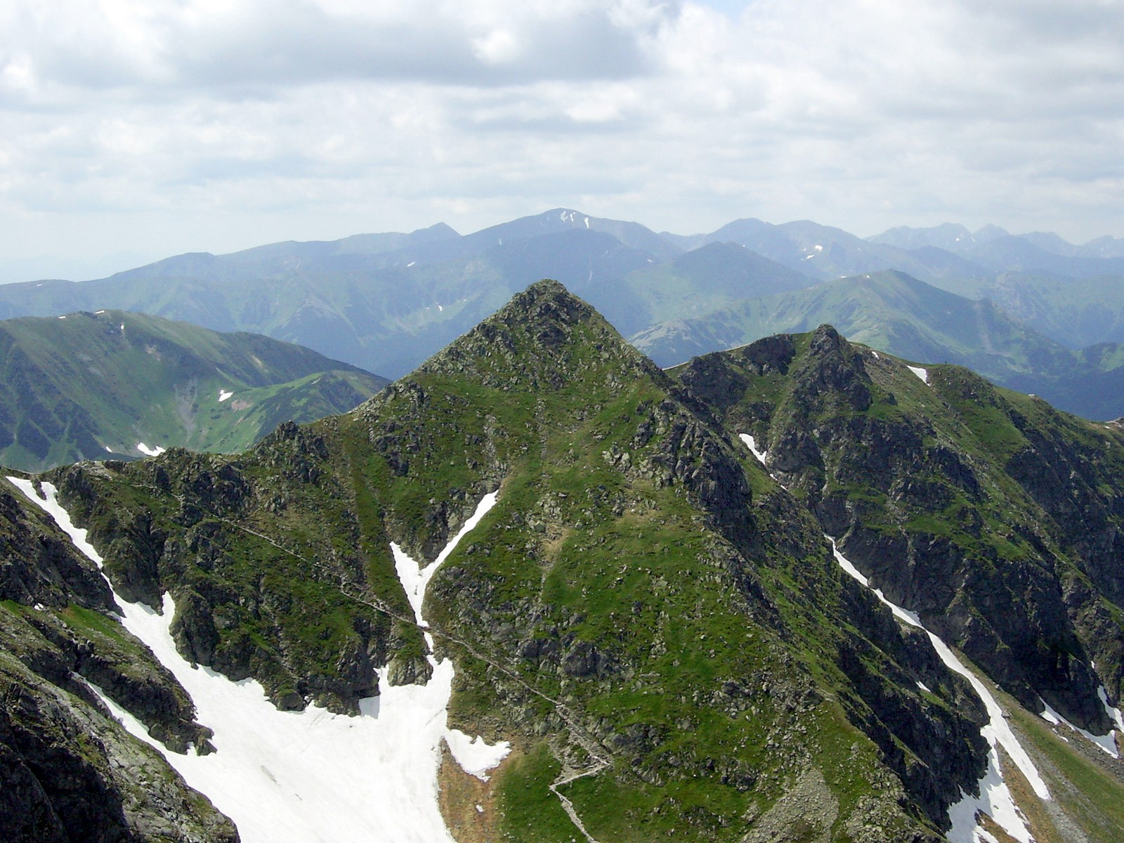 Pośrednia Turnia z Kościelca